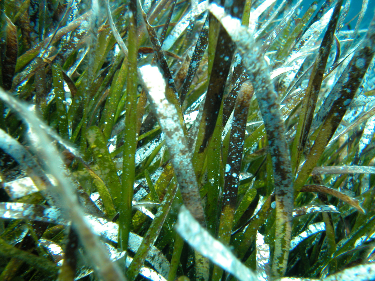 Posidonia oceanica